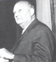 Andrea Guglielminetti, sindaco di Torino - immagine ridimensionata digitalmente